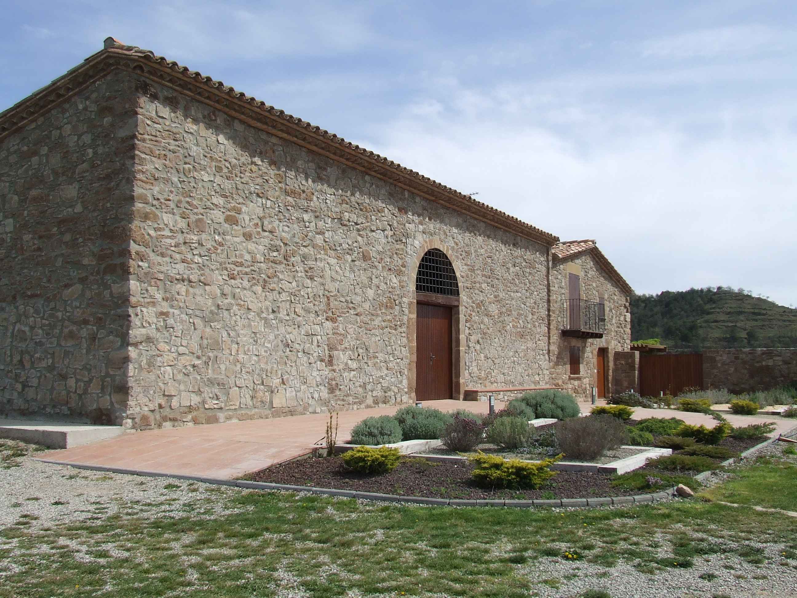 Puigmartre (l'Estany, Moianès)